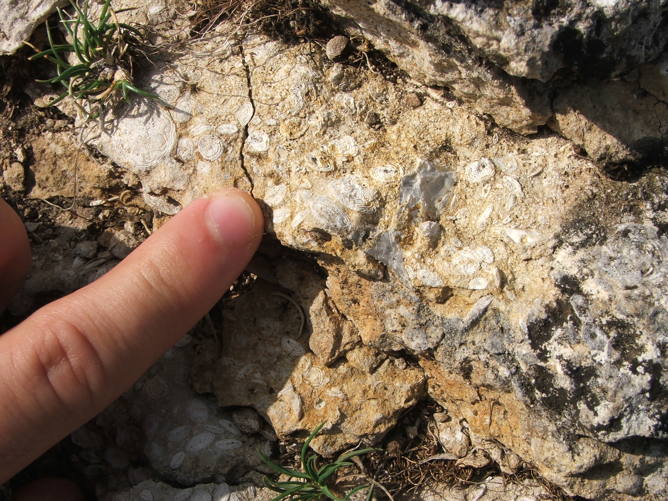 Macroforaminifera in Urbasa, Navarra, Spain